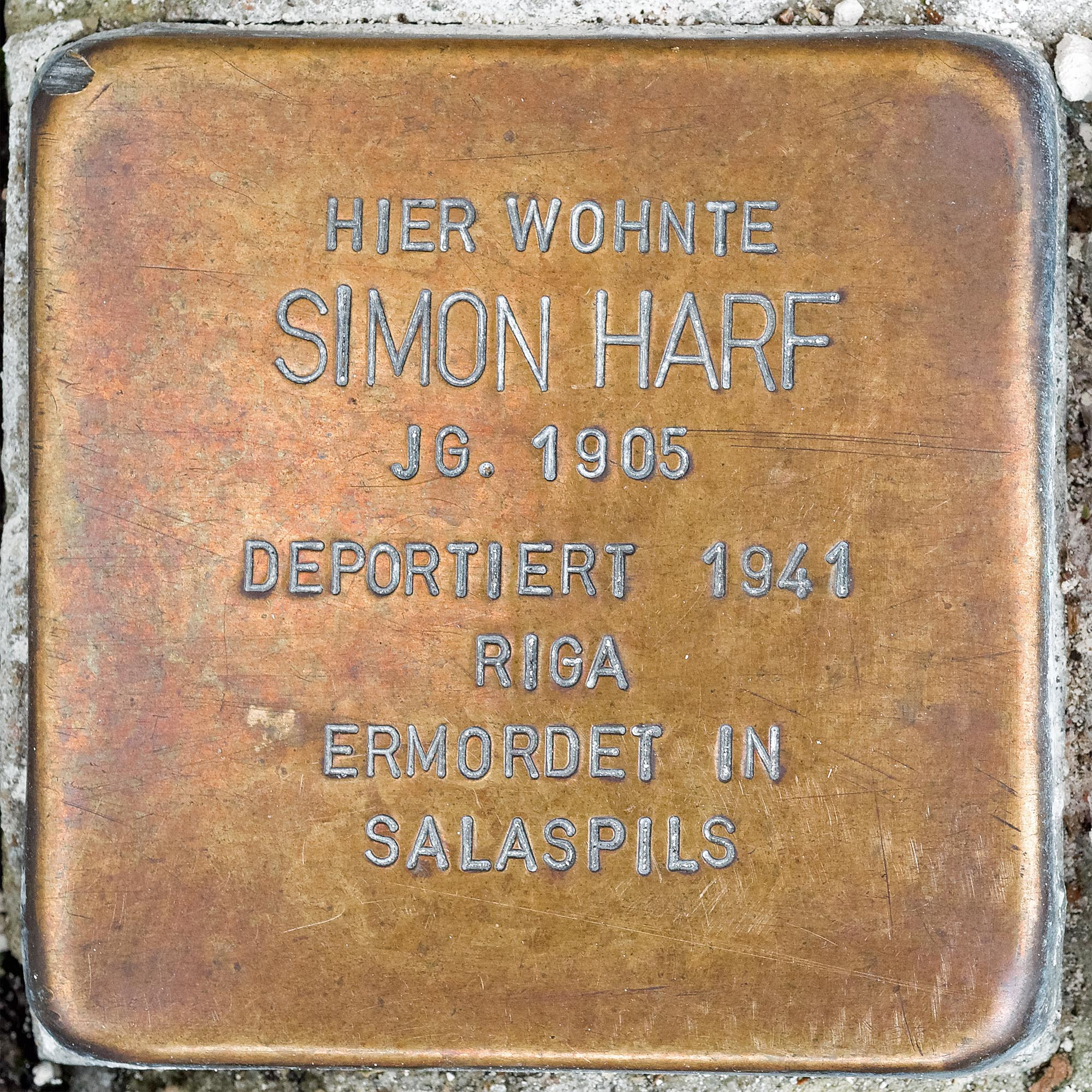 Stolperstein Harf, Simon